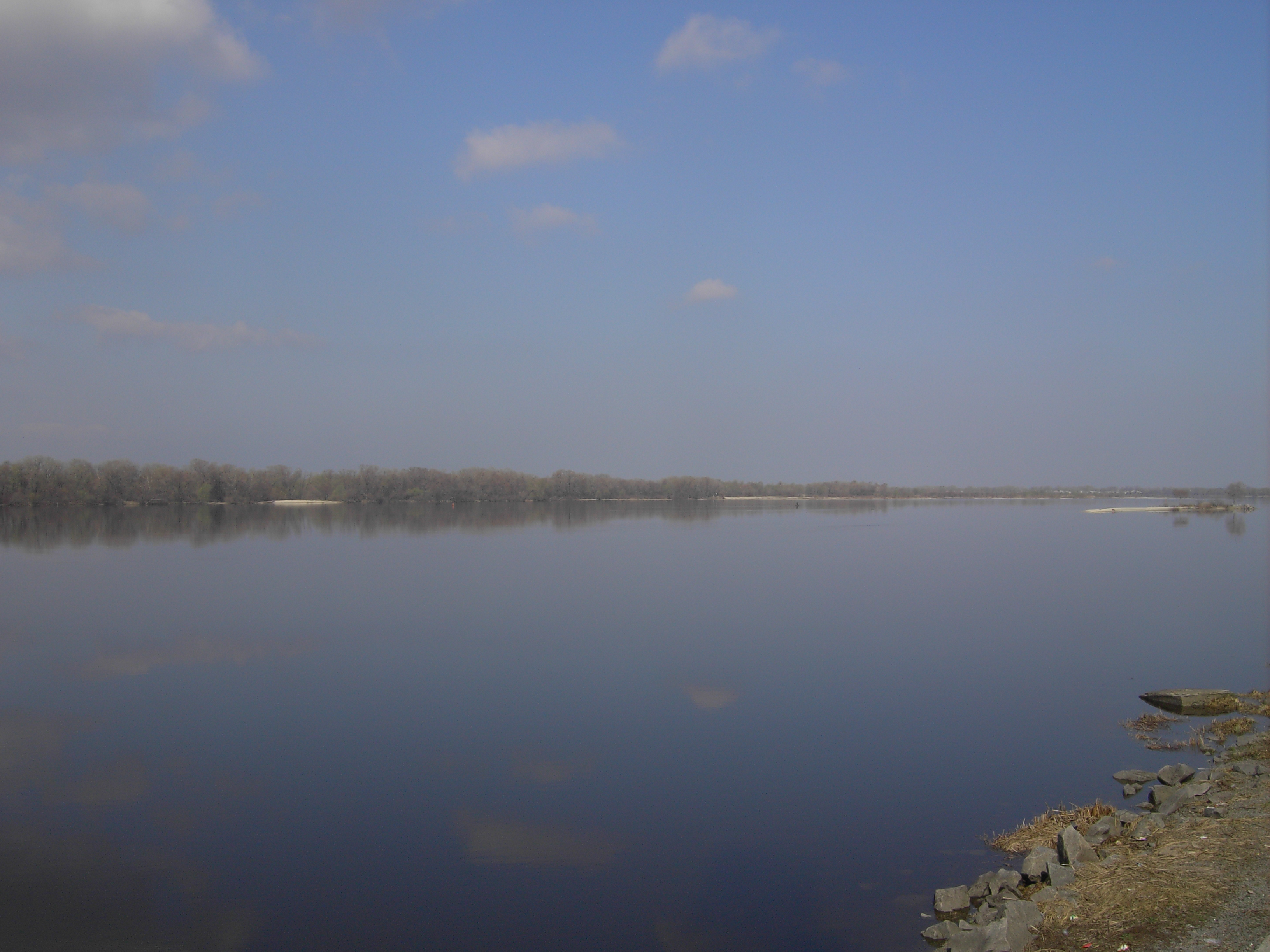 river Дніпро at Кременчук